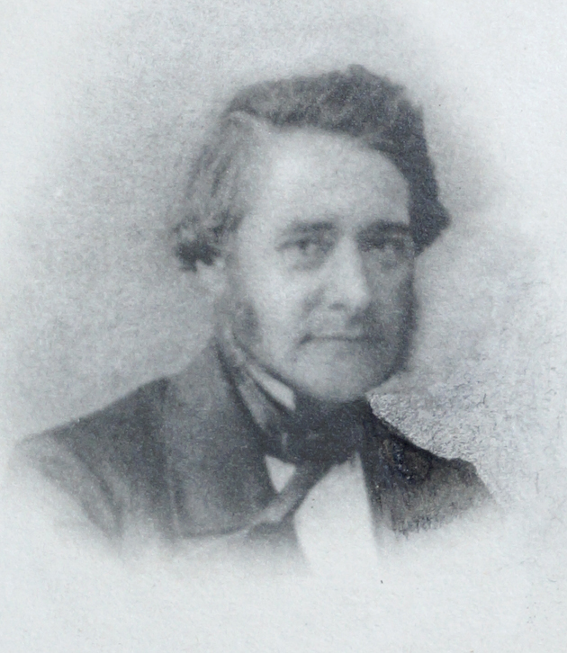 Benjamin Lafaye vers 1860